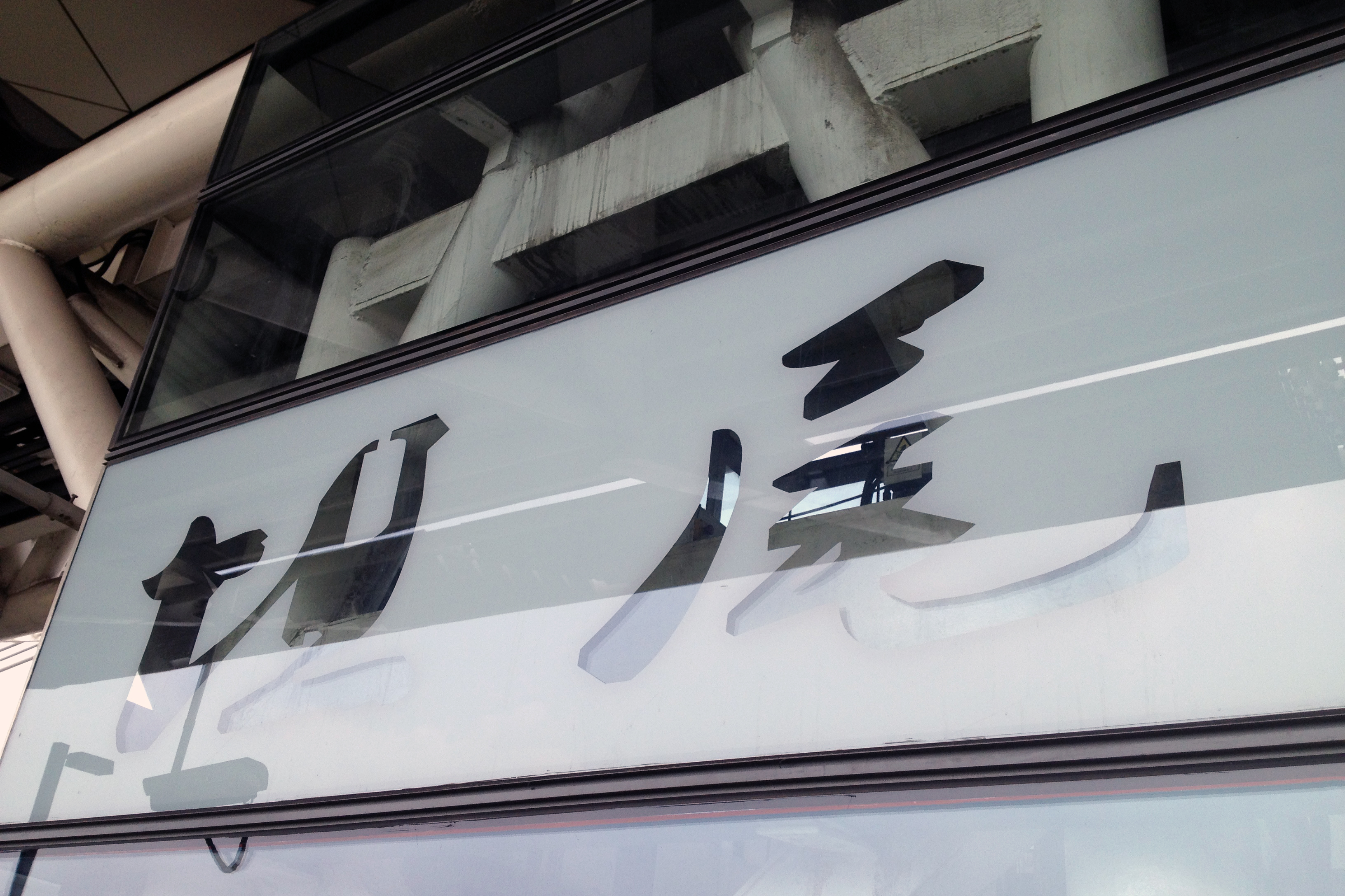 广州地铁5号线坦尾站月台书法字